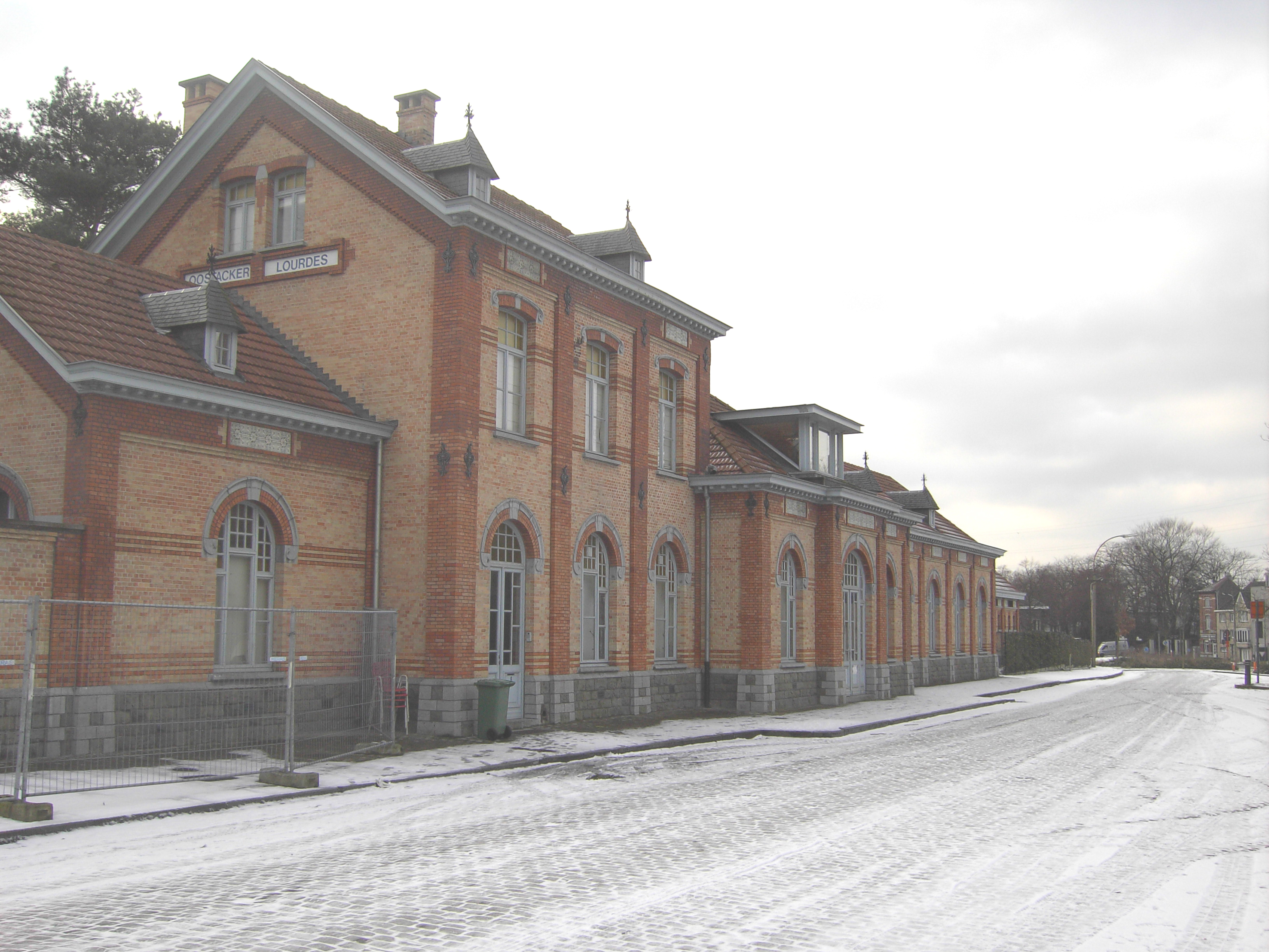 Treinstation in Oostakker-Lourdes - Gent in Belgium.